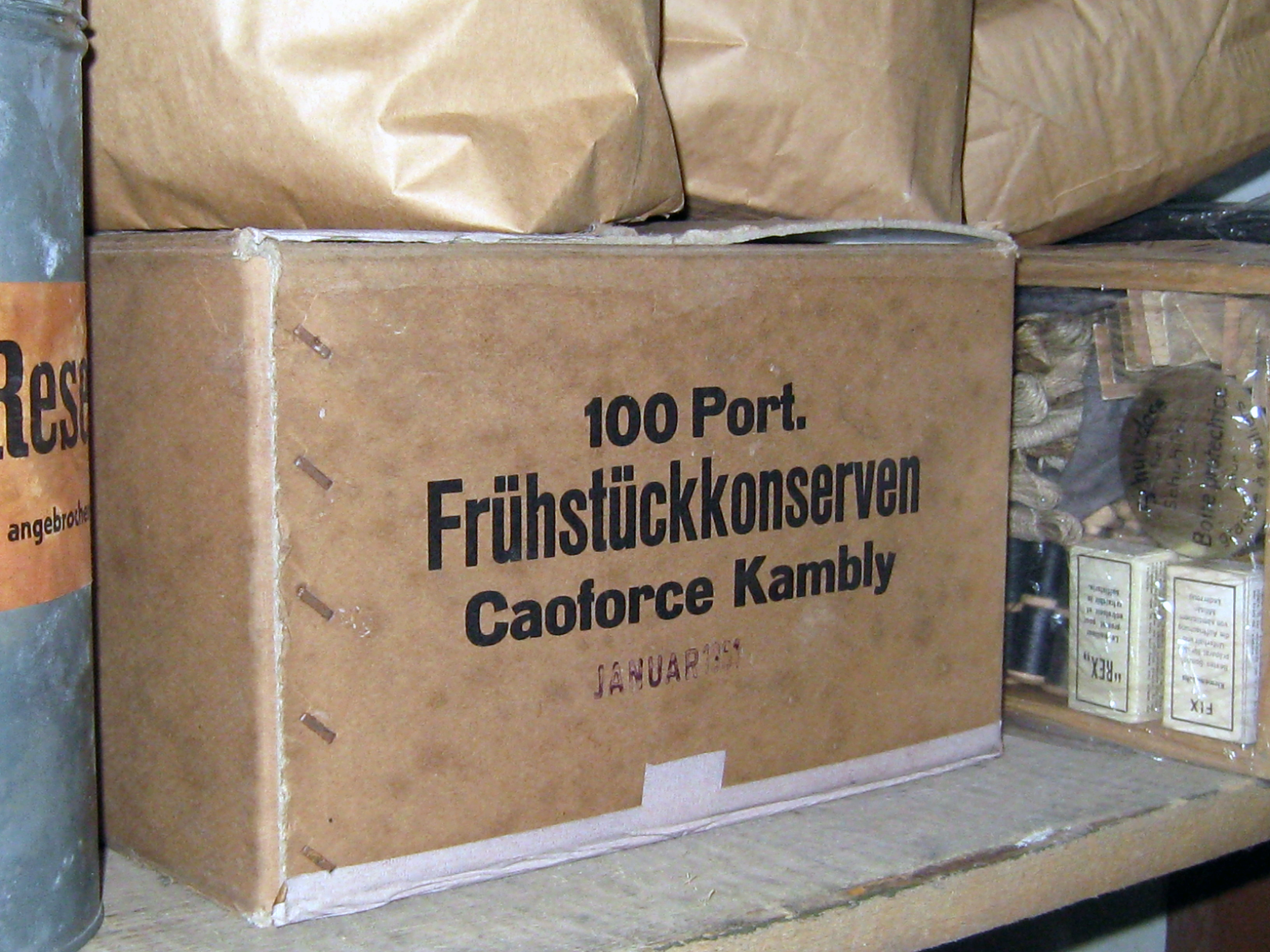 Infanteriewerk A 7838 in Sufers, Kanton Graubünden: Kampf dem Fugen-S